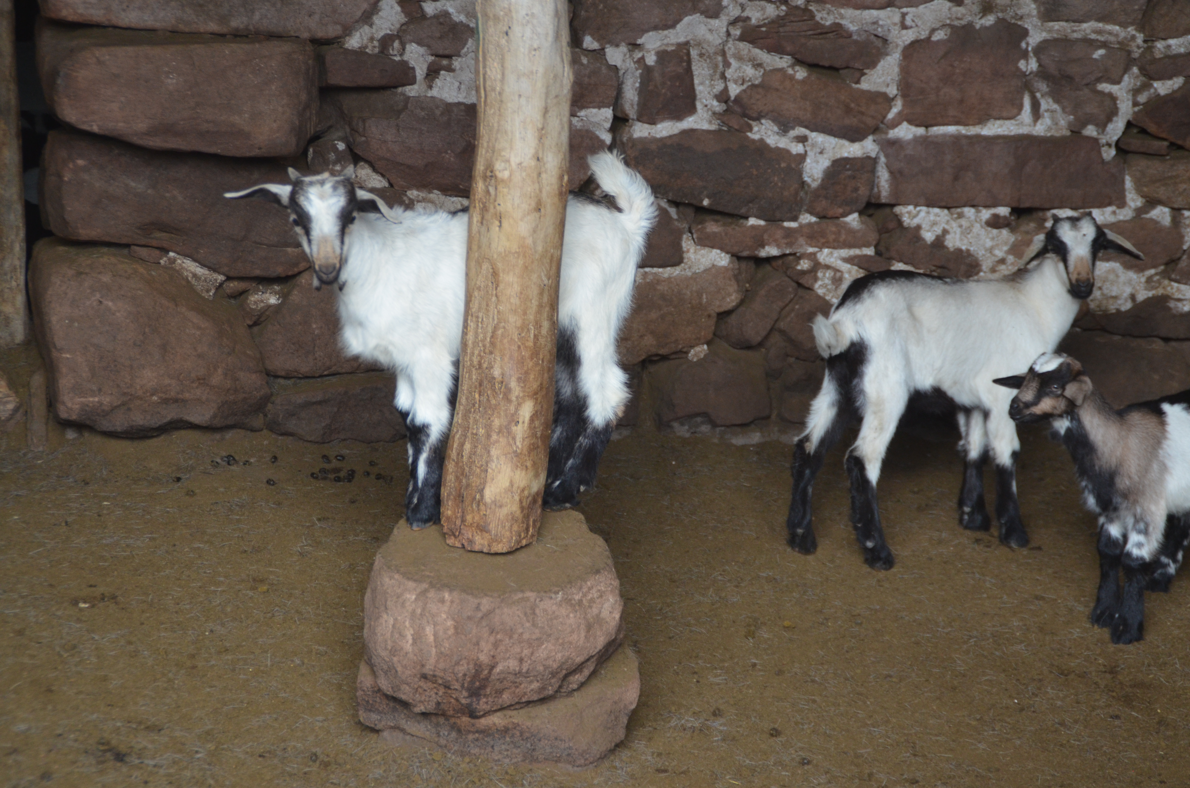 El interior de las parideras se ventila facilmente y proporciona un ambiente muy saludable al ganado